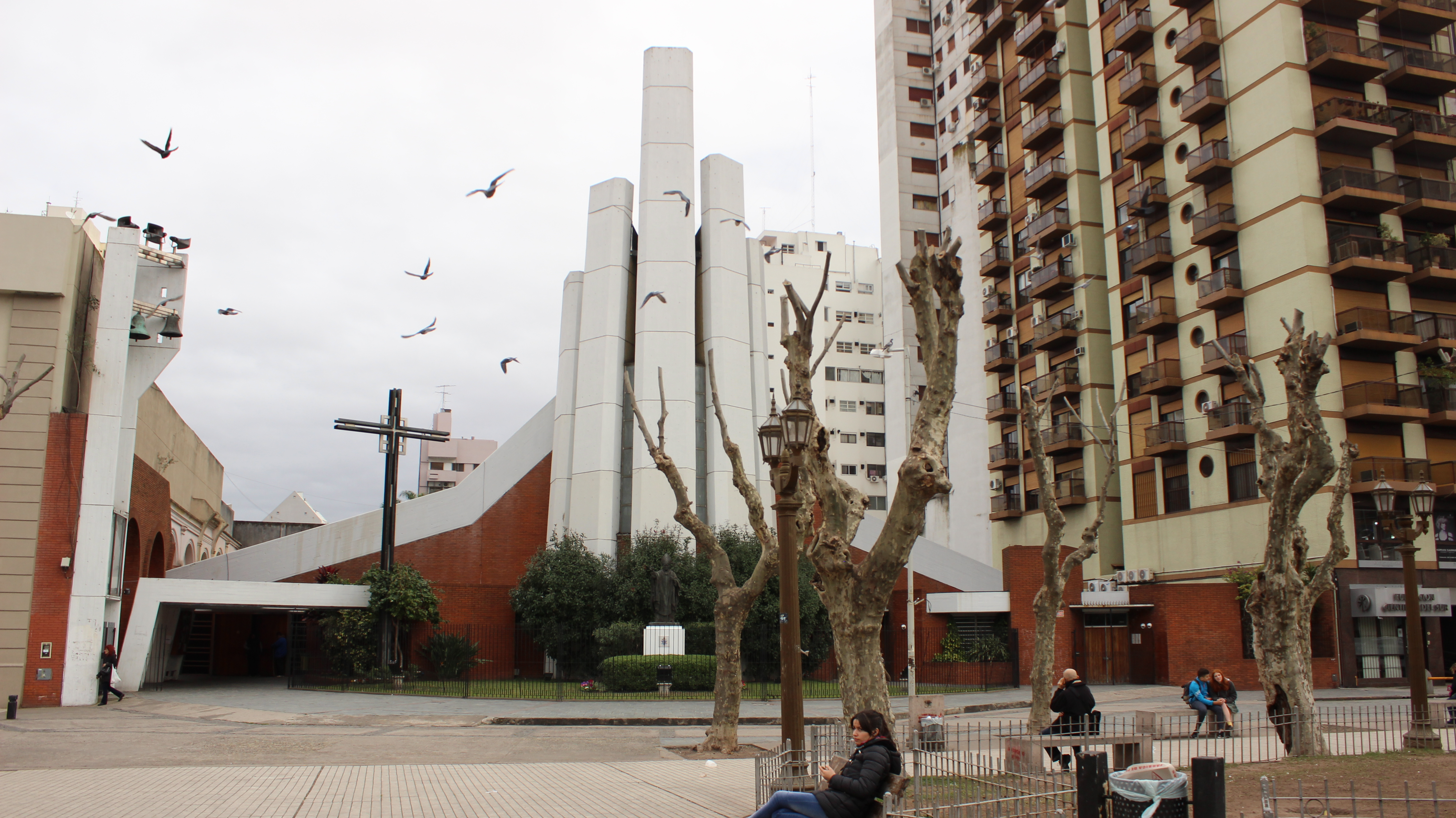 Foto tomada desde plaza Alsina a la Catedral de Avellaneda